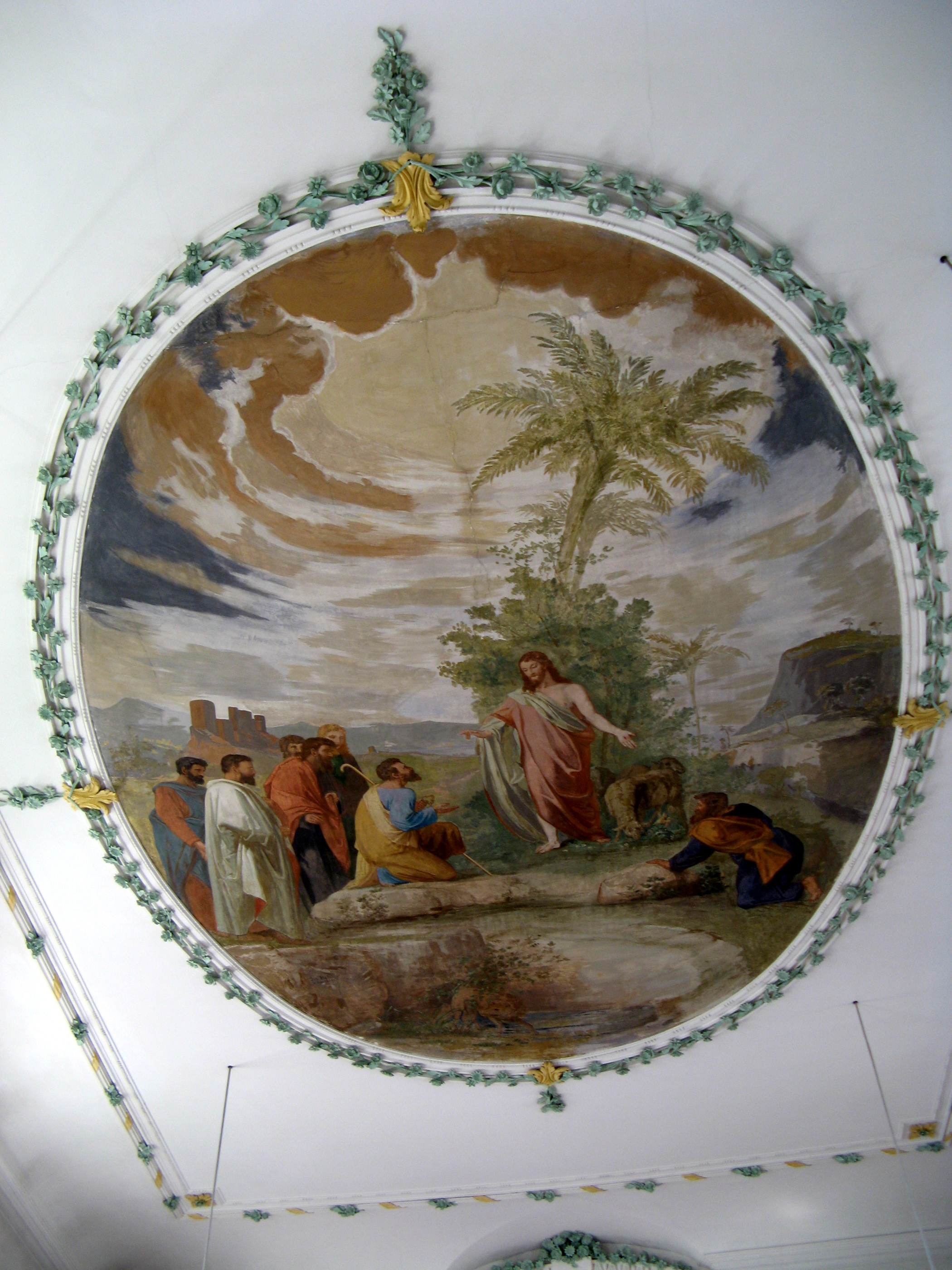 Pfarrkirche St. Germanus in Abtwil, Deckengemälde von Joseph Balmer